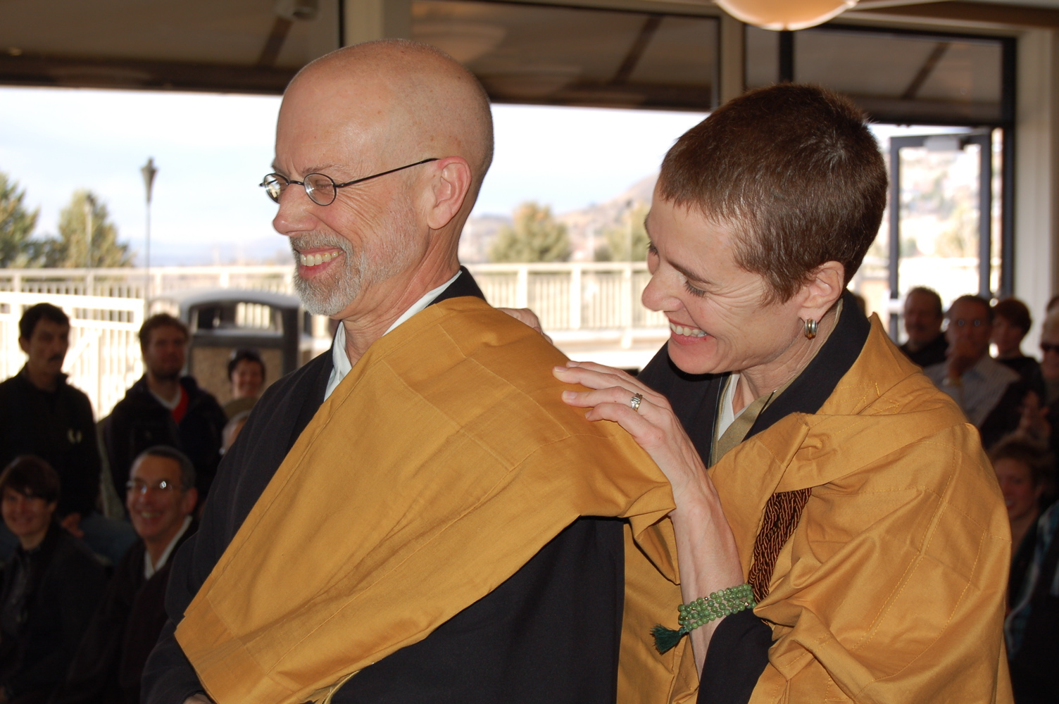 Michael Mugaku Zimmerman and Diane Musho Hamilton